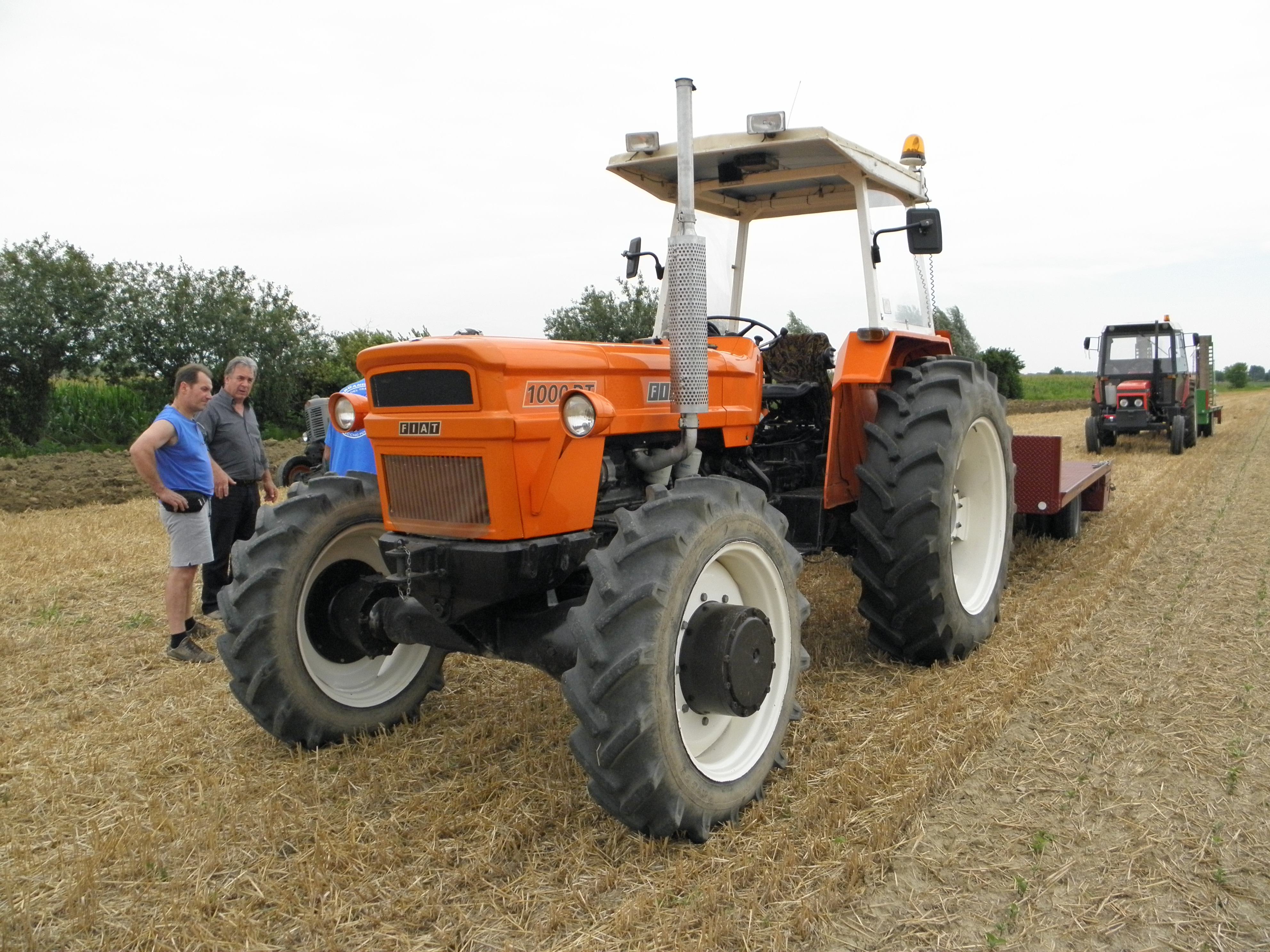 Concadirame, frazione di Rovigo: Fiat 1000 DT al raduno di trattori agricoli d'epoca ed aratura d'epoca, 29 giugno 2014.